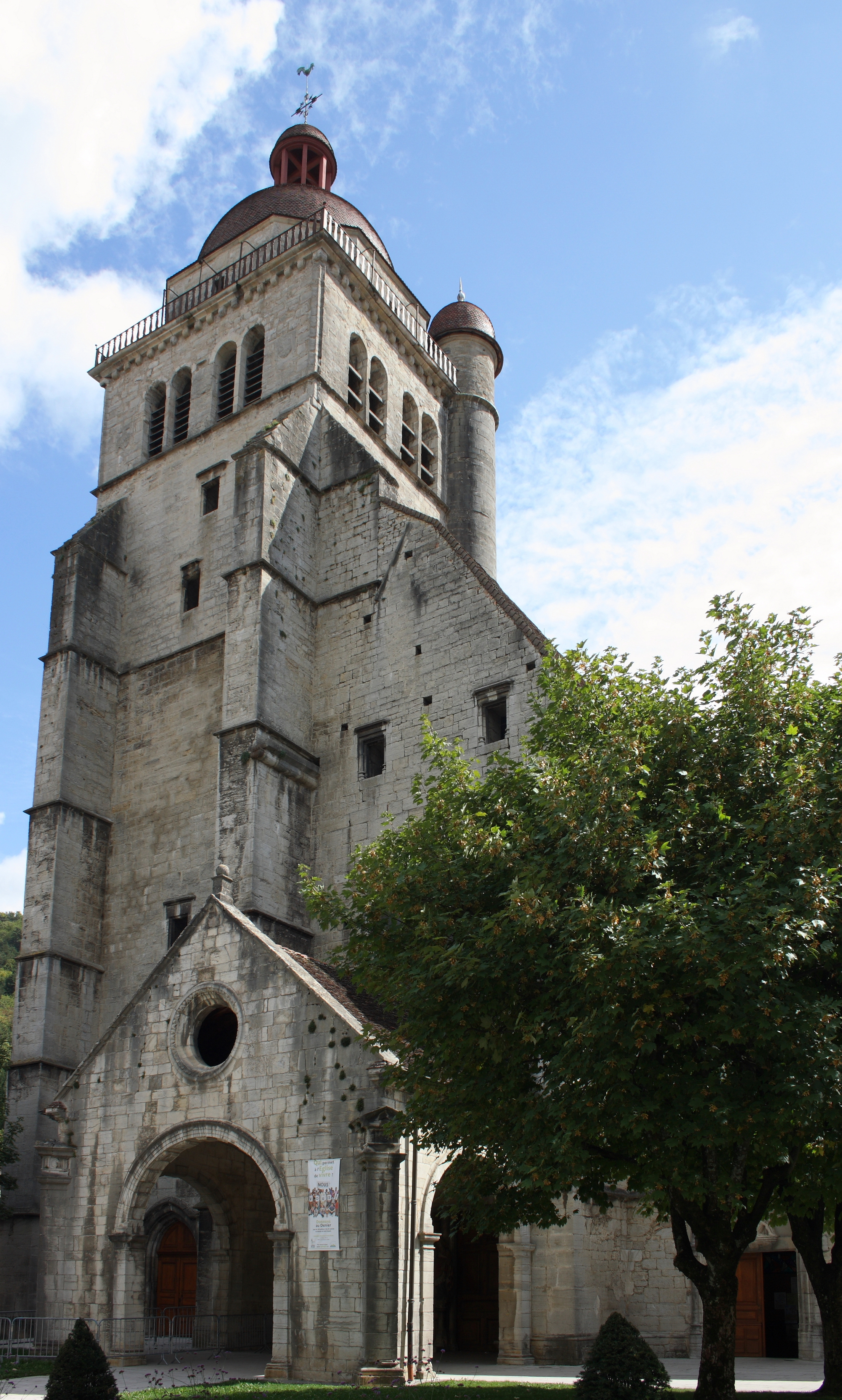 Ehemalige Kollegiatskirche St-Hippolyte in Poligny im Département Jura in der Region Franche-Comté(Frankreich), Westfassade mit Glockenturm